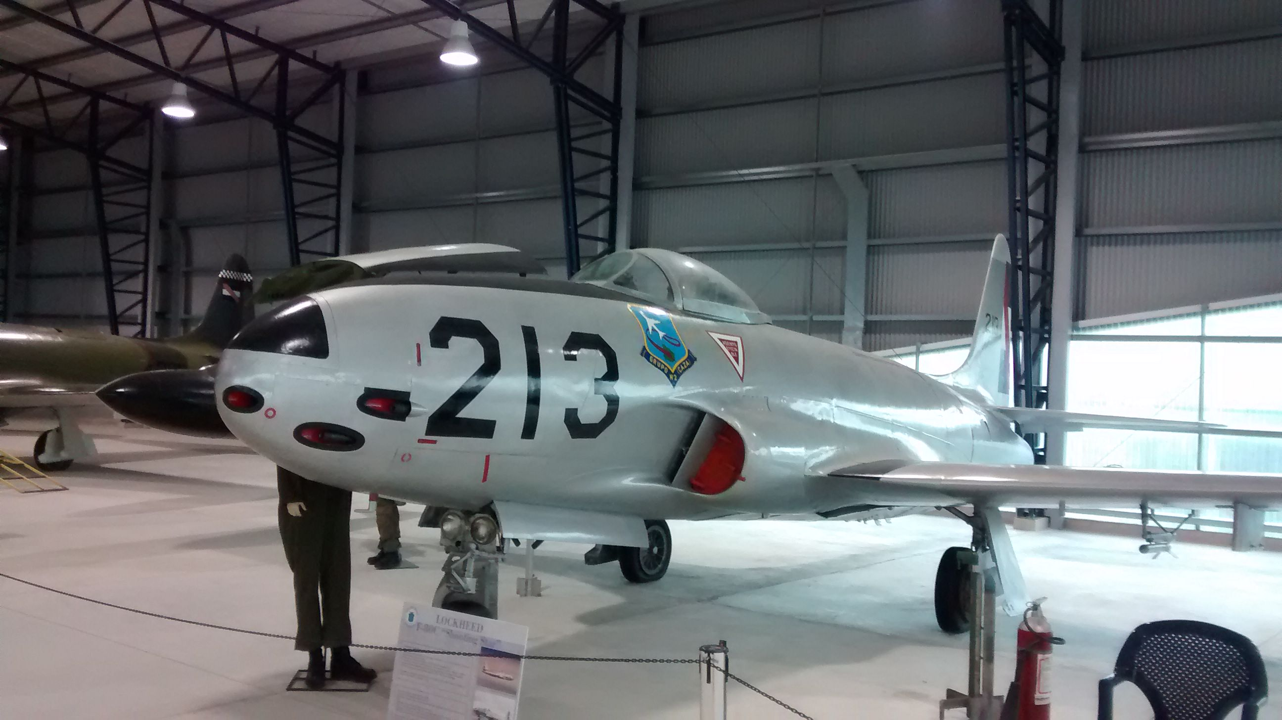 FAU213 lateral